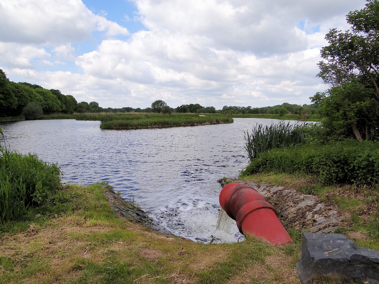 Zuleitung von gereinigtem Abwasser in die Schönungsteiche der Rieselfelder.